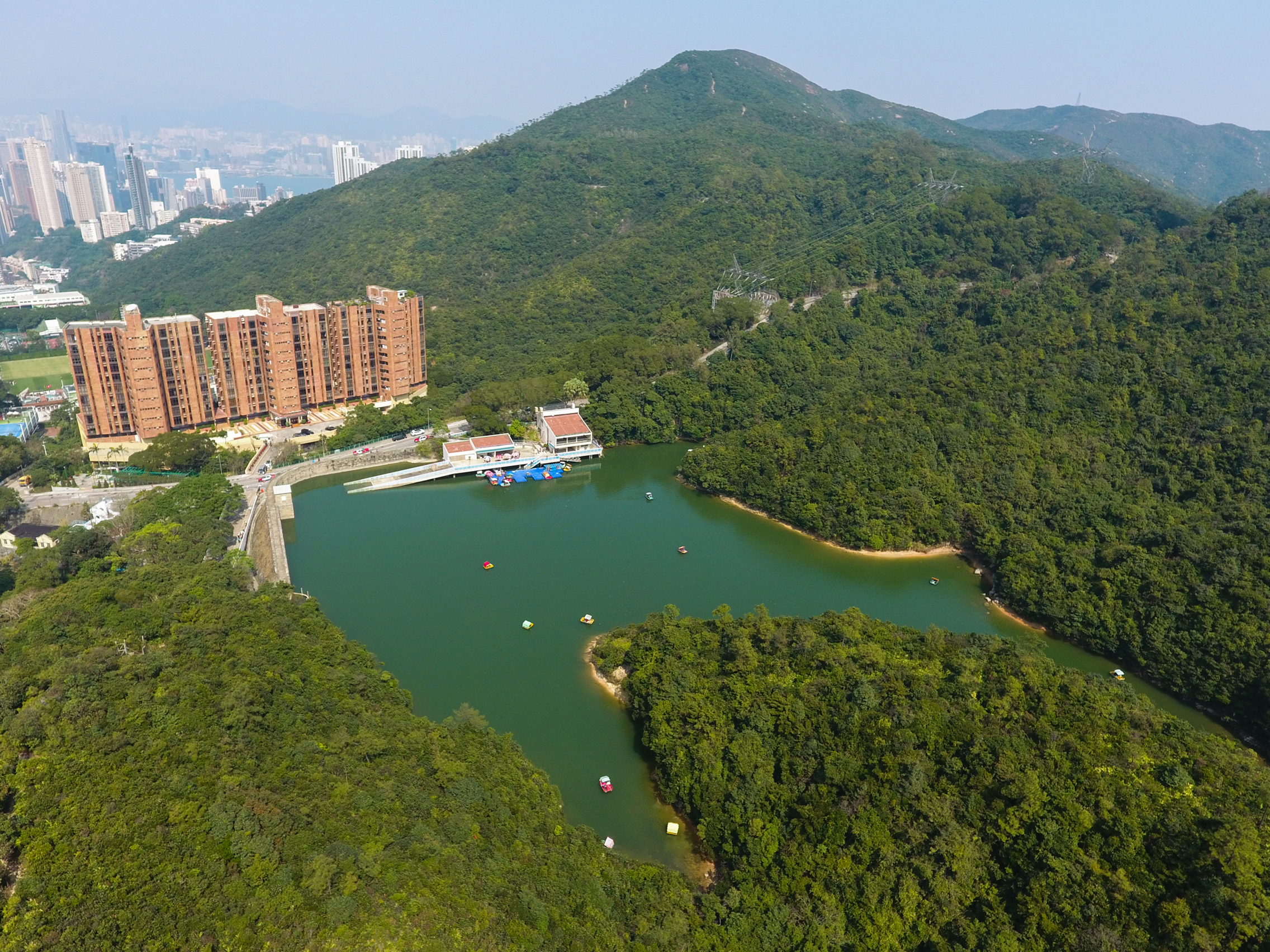 Wong Nai Chung Reservoir